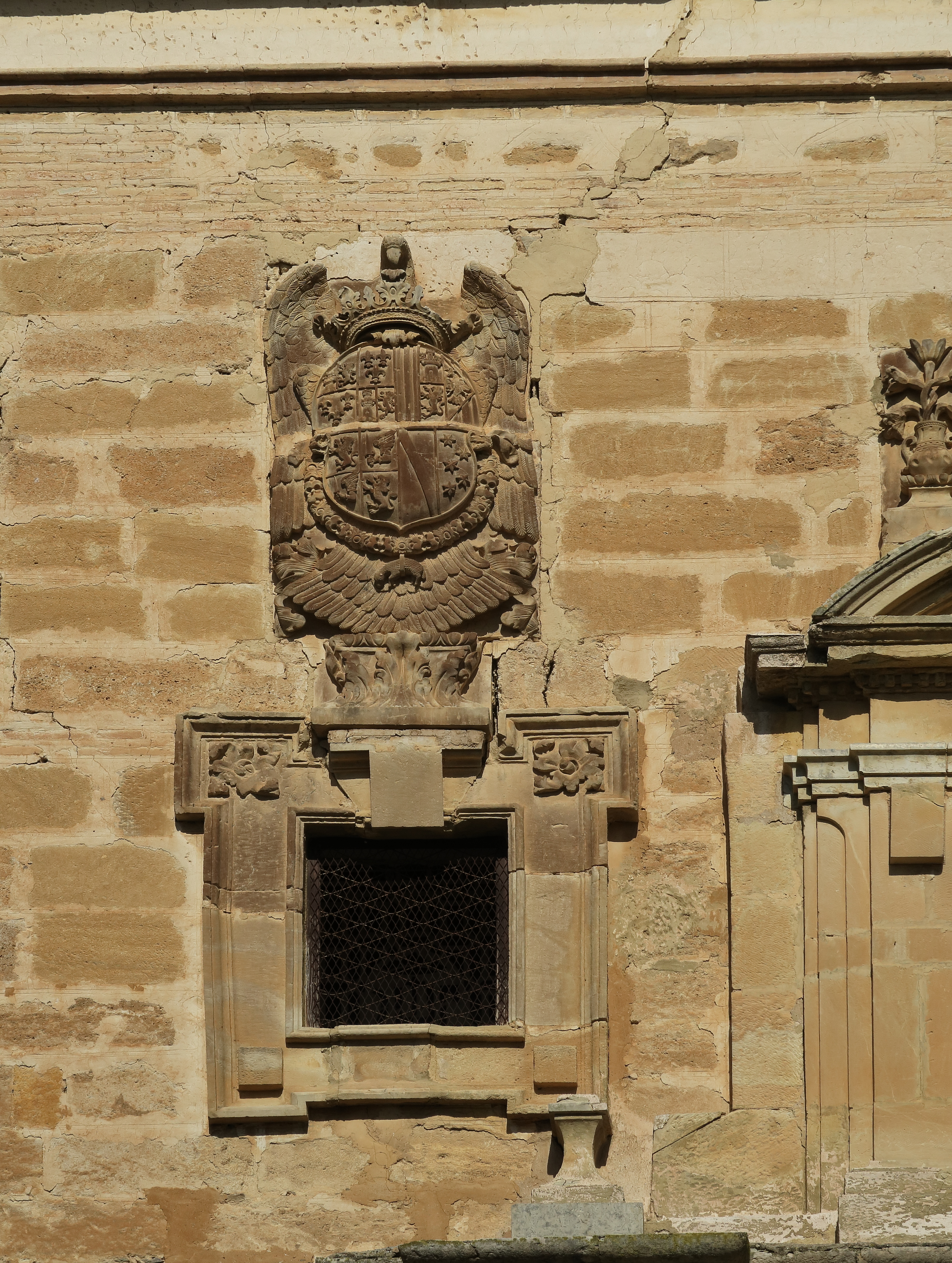 Encinas Reales, Ermita del Calvario, detalle fachada, escudo izquerdo